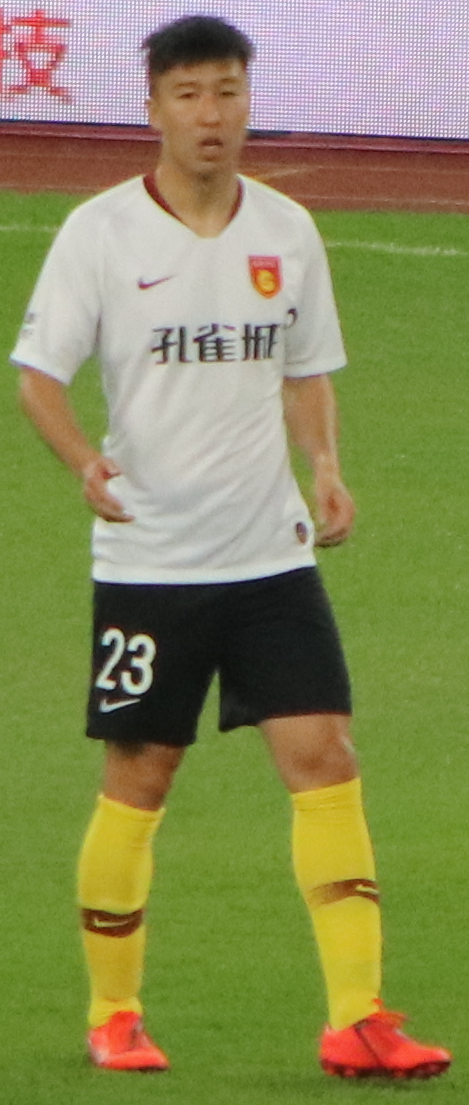 中文（中国大陆）: 河北华夏幸福球员：任航